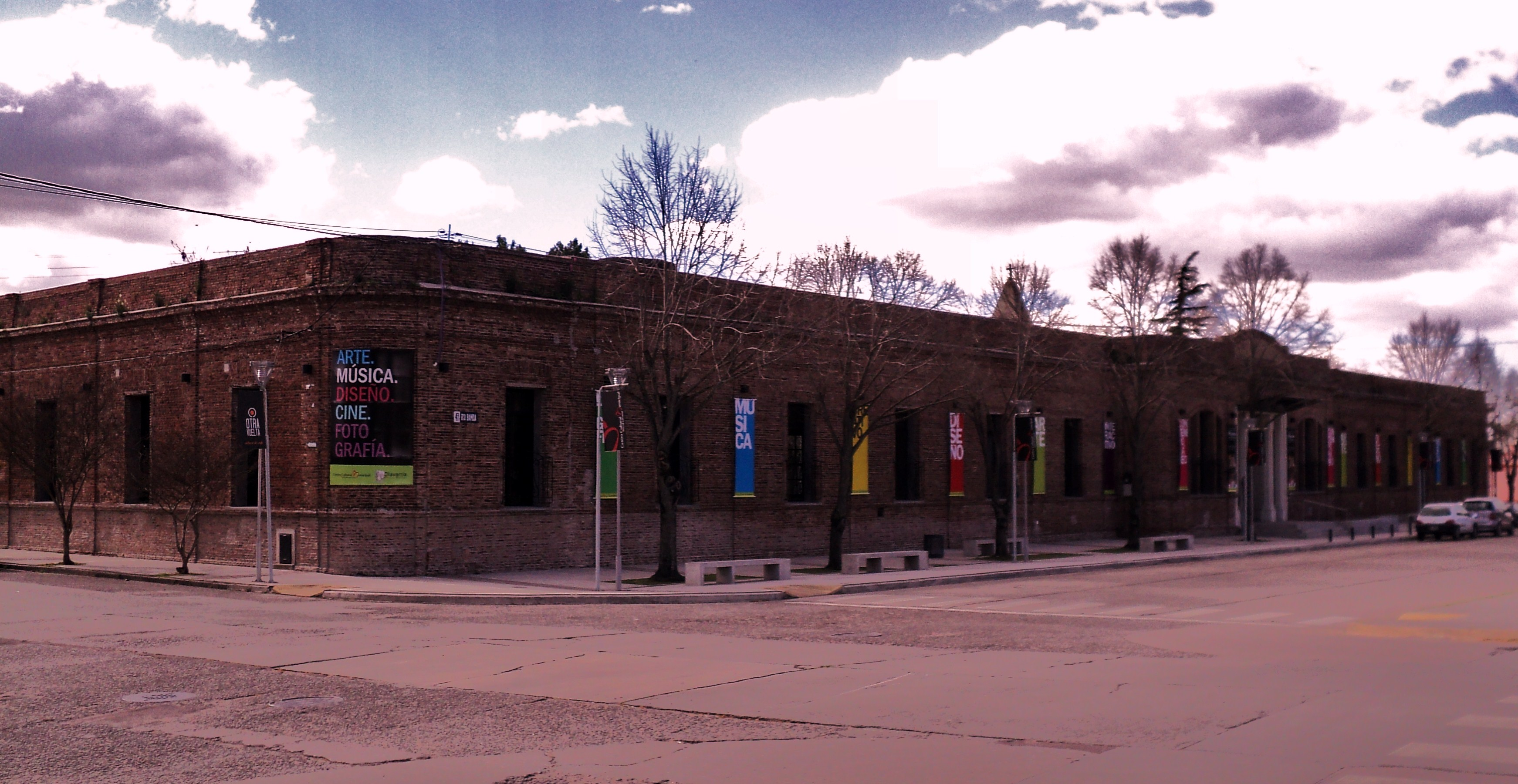 centro cultural de Olavarria